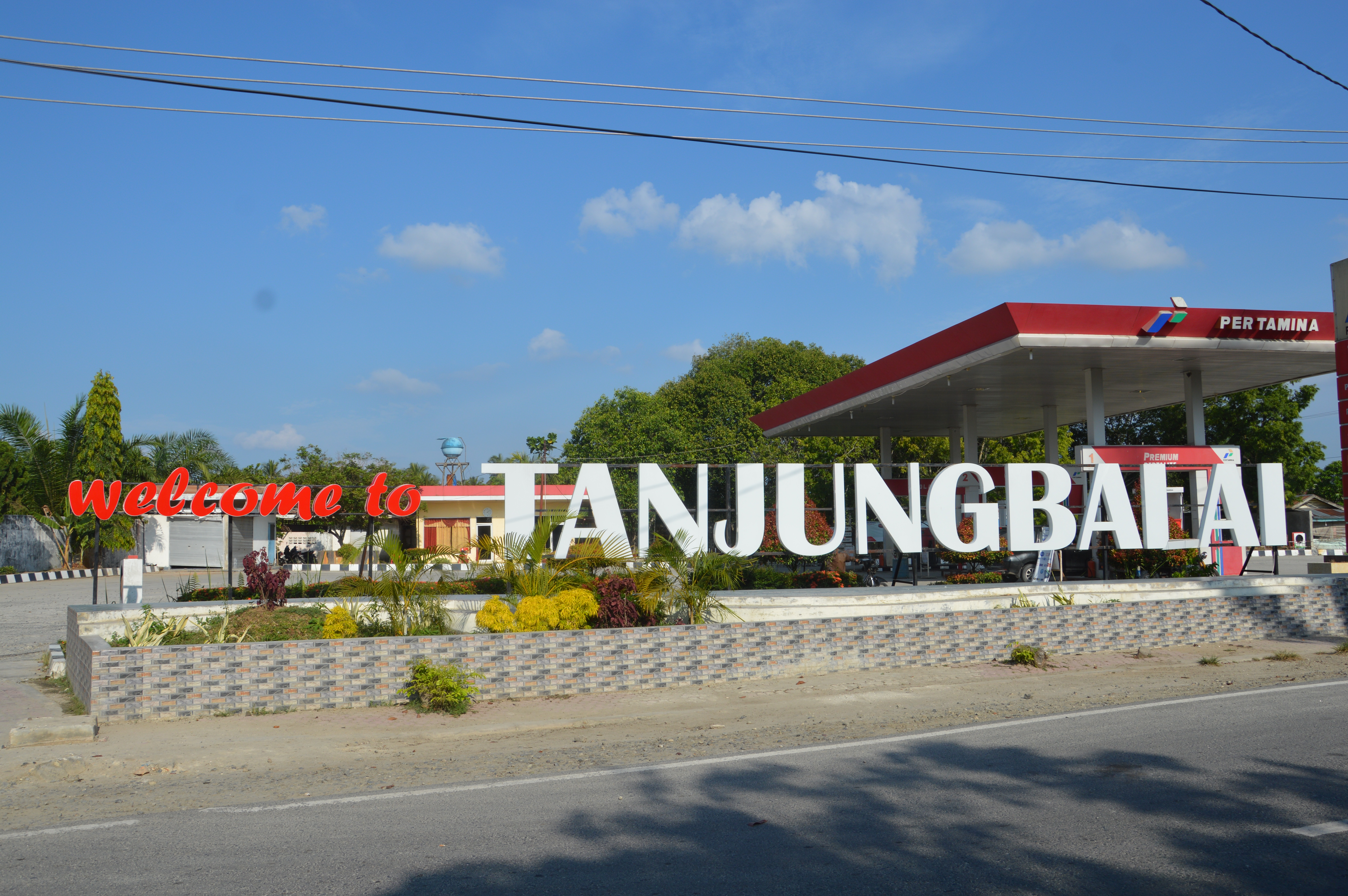 Selamat Datang di Tanjungbalai